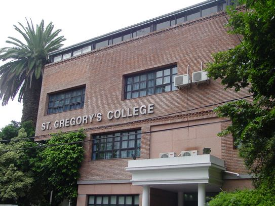 Colegio San Gregorio de Vicente Lopez